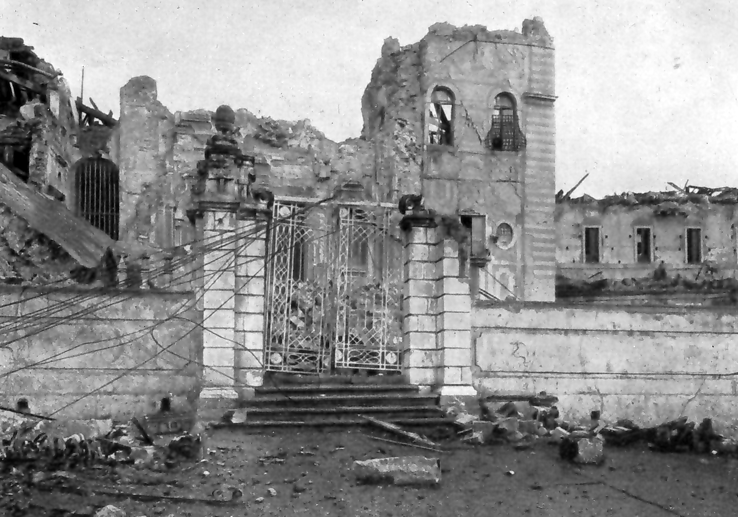 Le rovine della Chiesa di San Gregorio a Messina, che era stata progettata nel 1702 da Filippo Juvarra, dopo il terremoto del 1908.